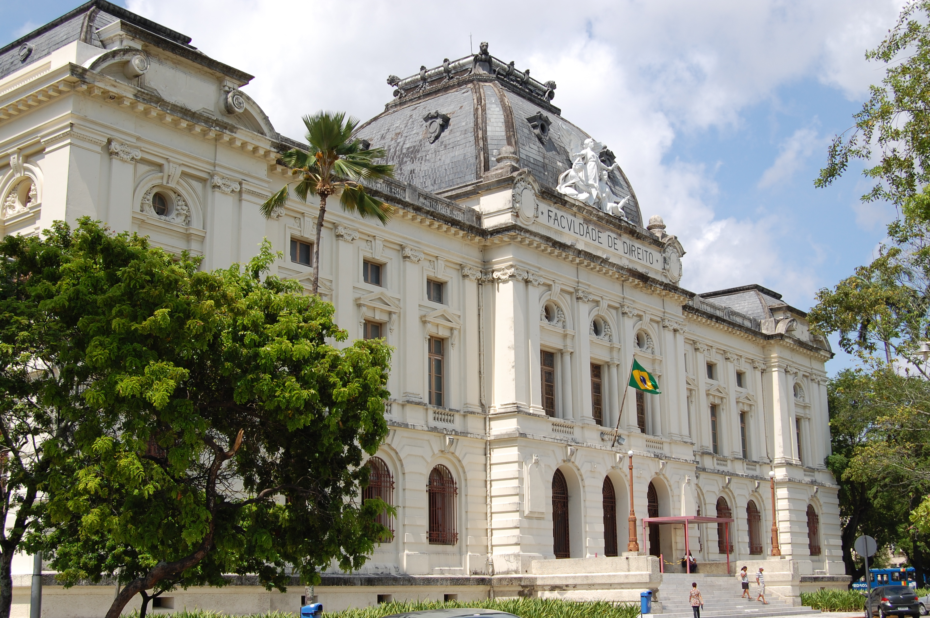 O edifício da Faculdade de Direito da Universidade Federal de Pernambuco.